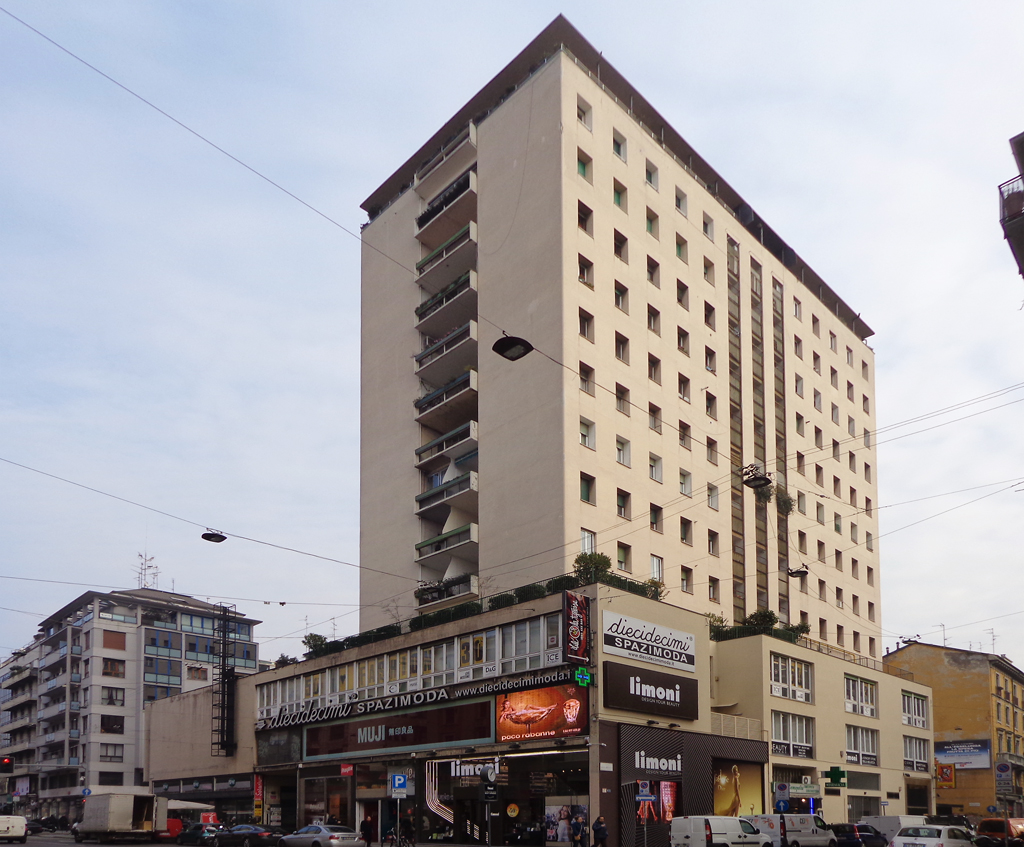 Milano, edificio per abitazioni, uffici, negozi e cinematografo, detto “Palazzo Argentina”, in corso Buenos Aires angolo via Giuseppe Broggi, via Giovanni Masera e via Francesco Redi. Fu costruito dal 1947 al 1949 su progetto di Piero Bottoni e Guglielmo Ulrich. Fonte: Maurizio Grandi e Attilio Pracchi, Milano. Guida all'architettura moderna, Bologna, Zanichelli [1980], 1998, p. 249. ISBN 88-08-05210-9.